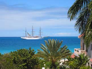 Sailing in Anguilla